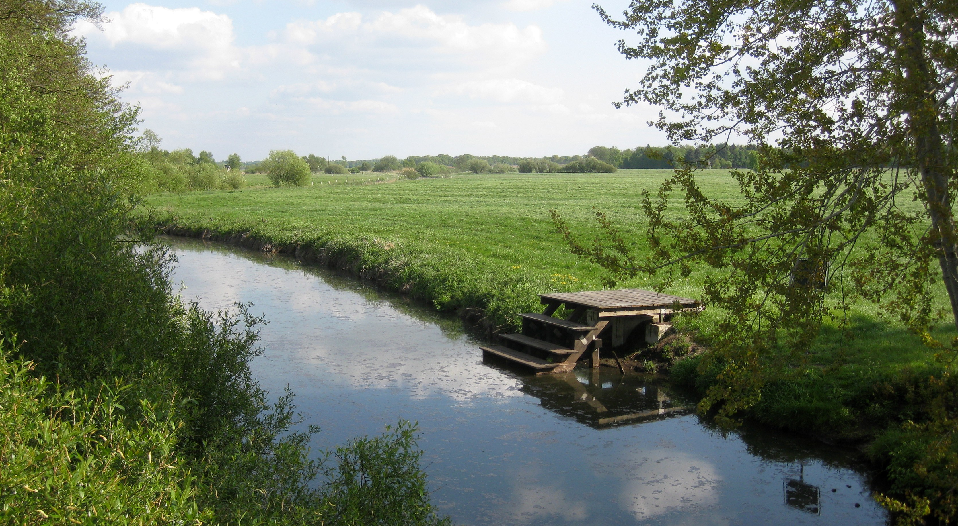 Kanuableger an der Lune in Lunestedt